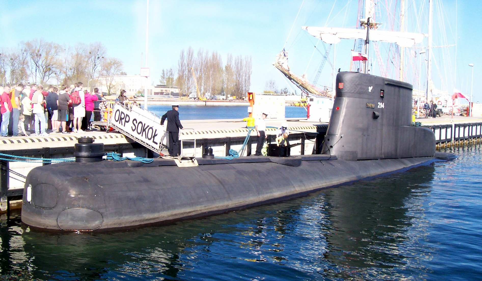 Okręt podwodny klasy Kobben ORP Sokół w porcie wojennym w Gdyni (Oksywie)